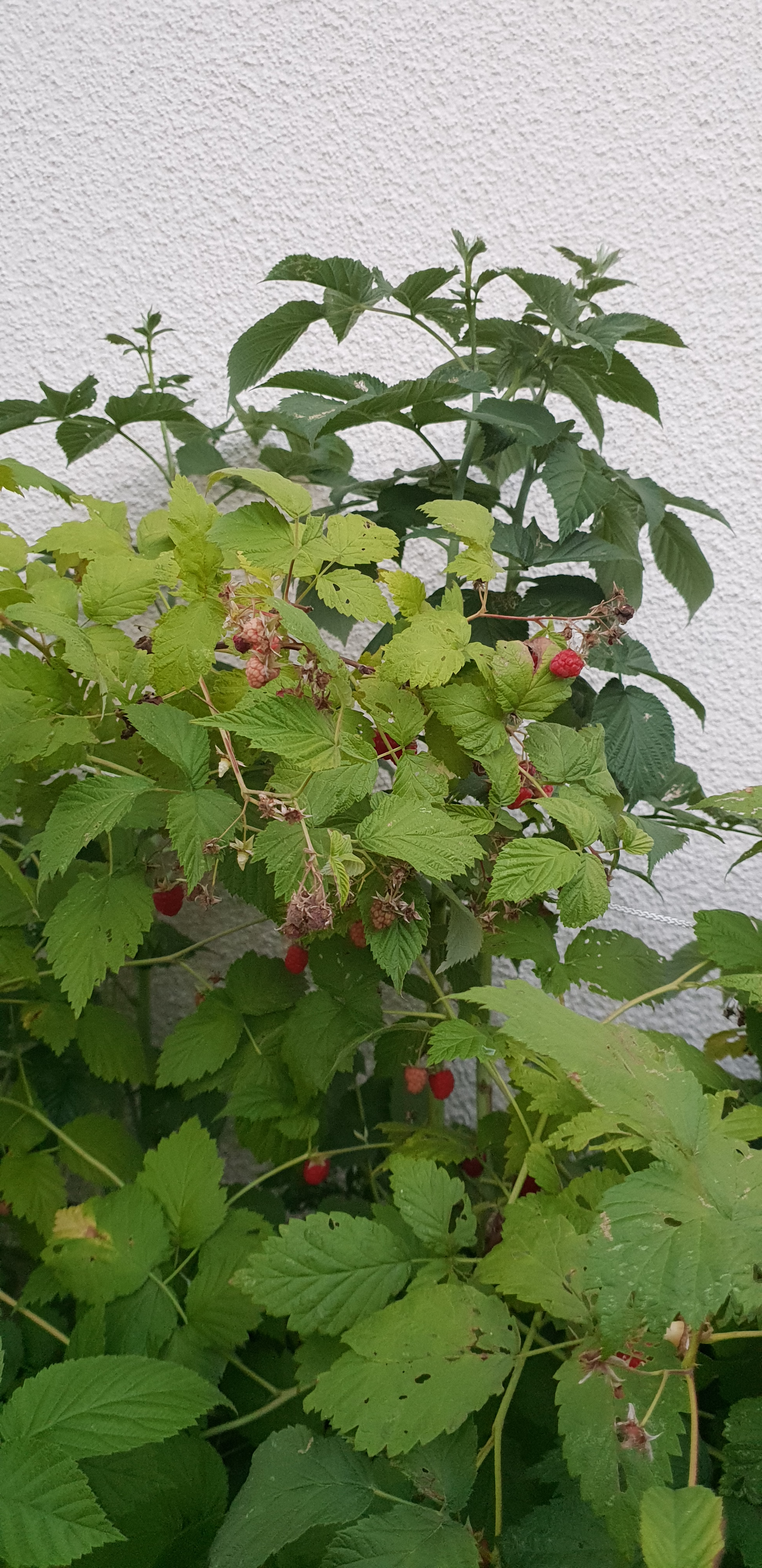 Tiges fructifiant de l'année précédente, nouvelle tige sans fruits qui fructifieront l'année suivante